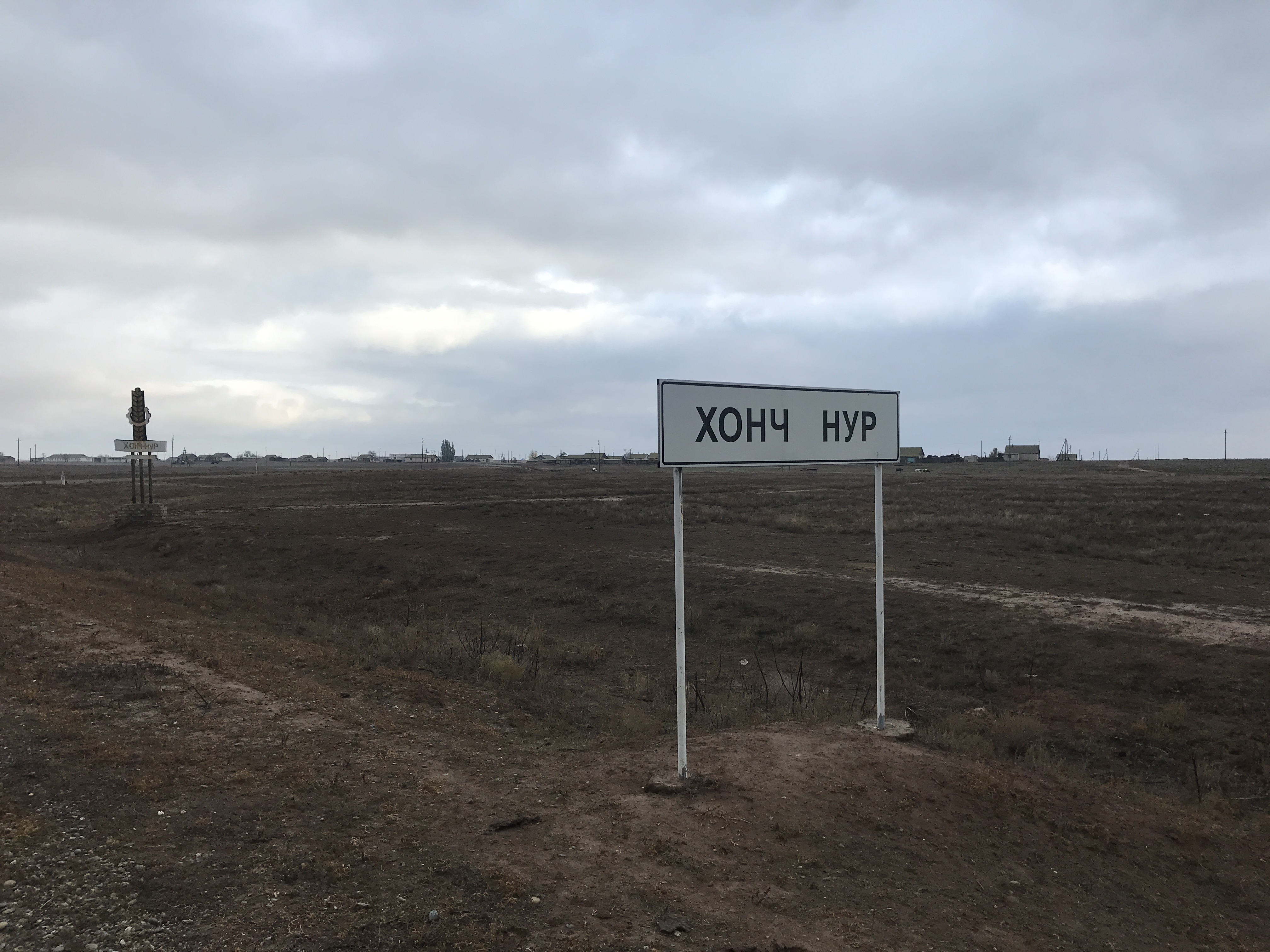 Въезд в Посёлок Хонч Нур Малодербетовского района Россия